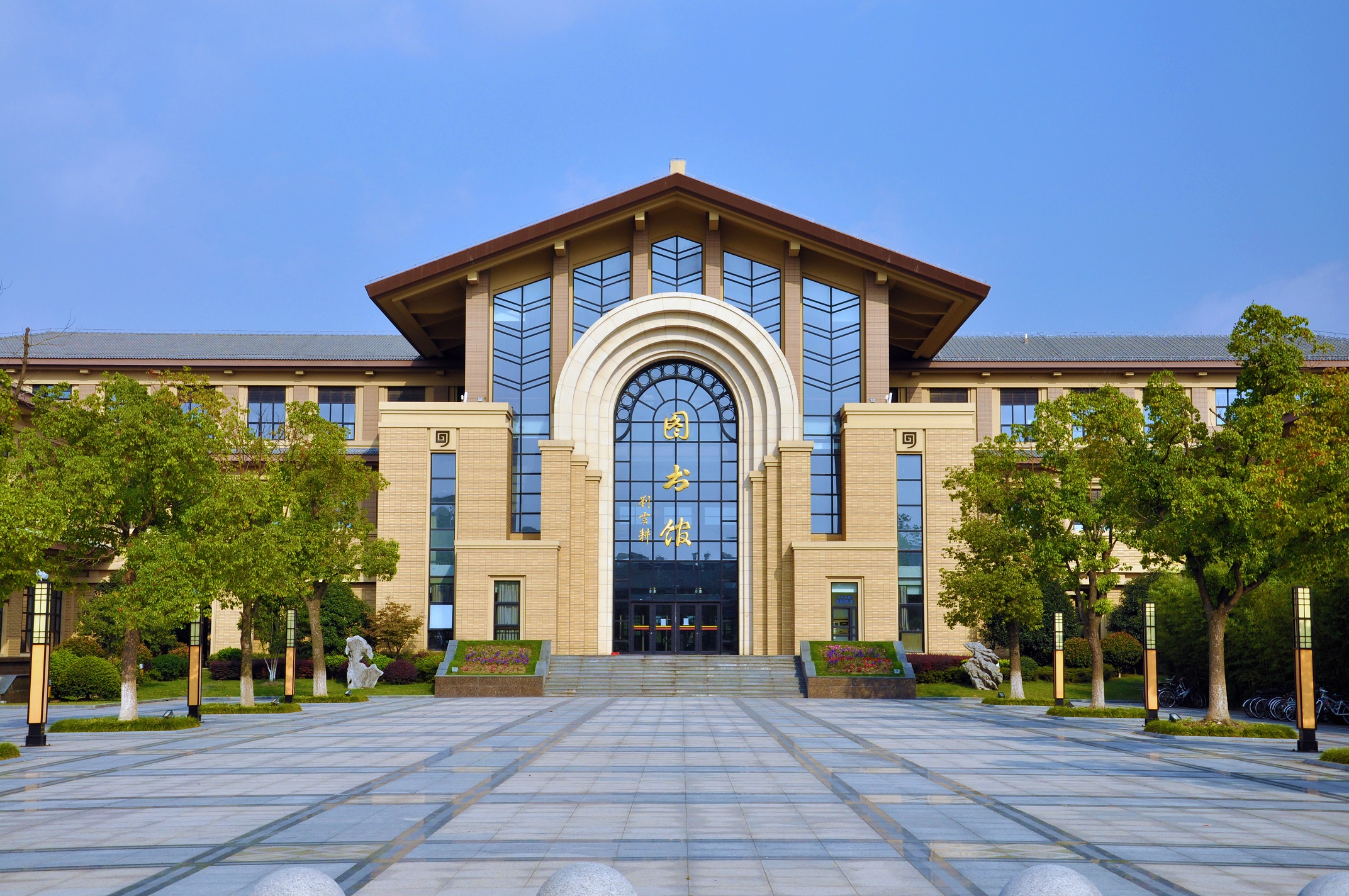 上海政法学院图书馆